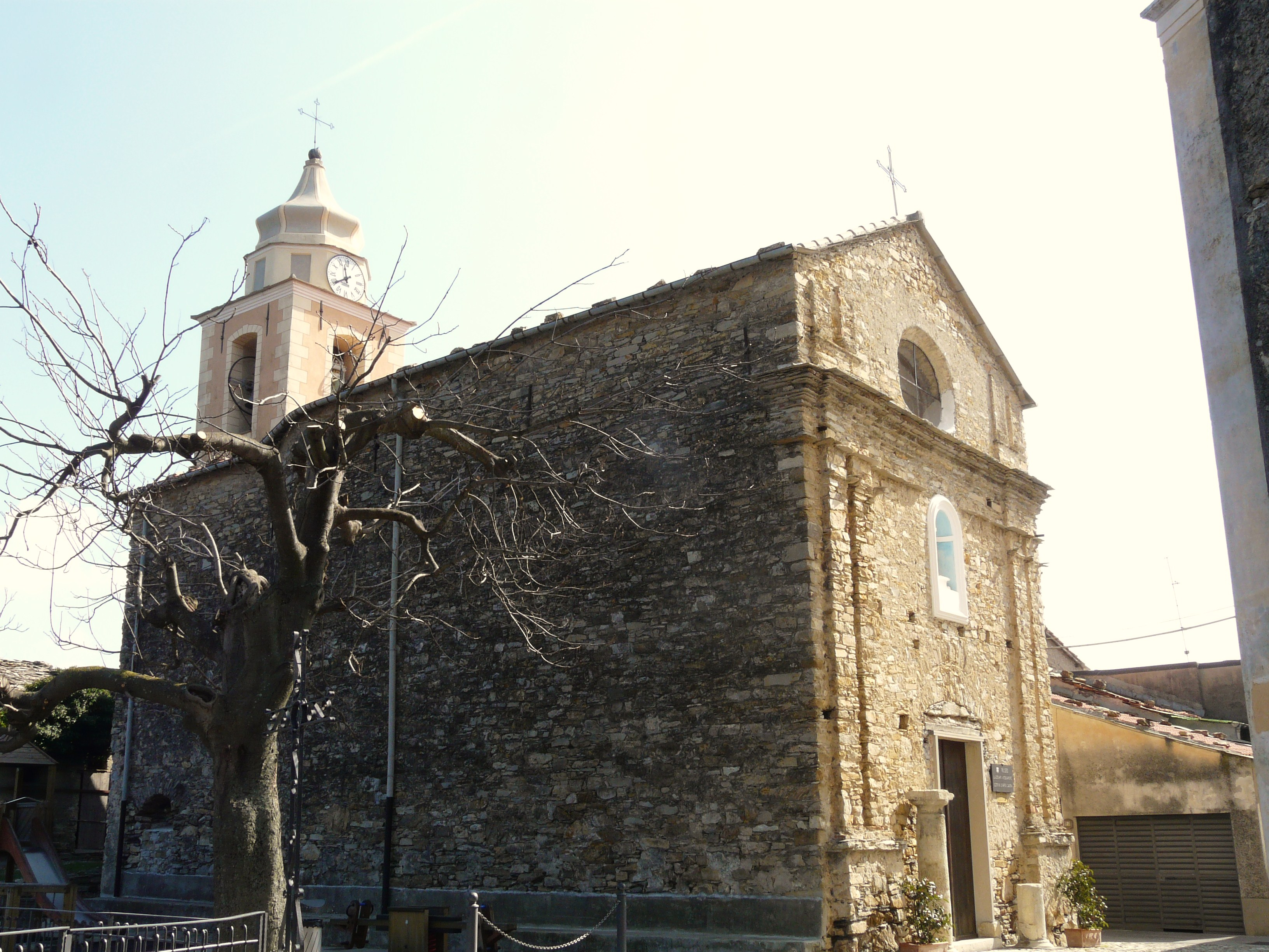 Oratorio di San Giovanni, Lucinasco, Liguria, Italia